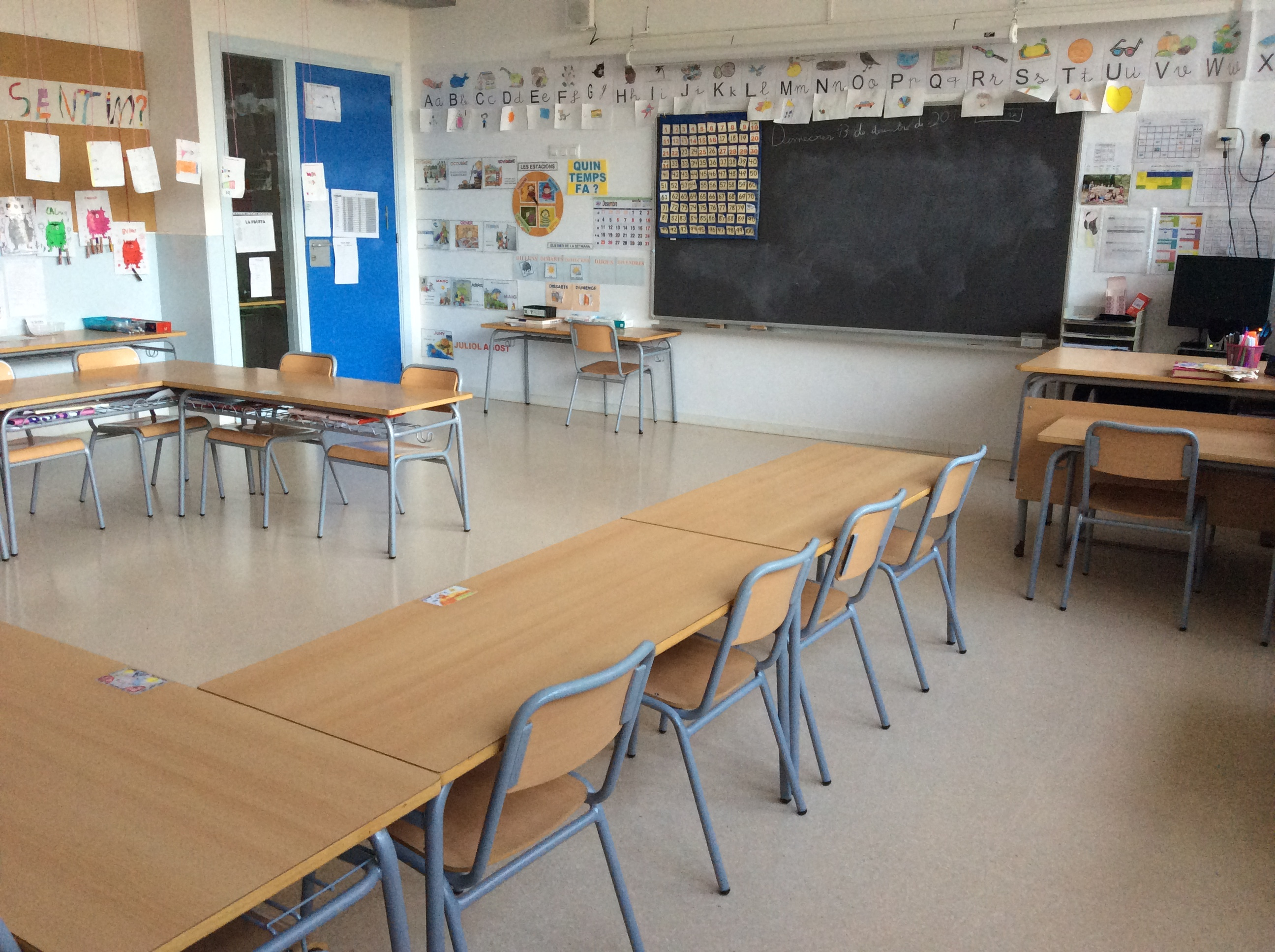 Aula on es podria dur a terme una actuació educativa